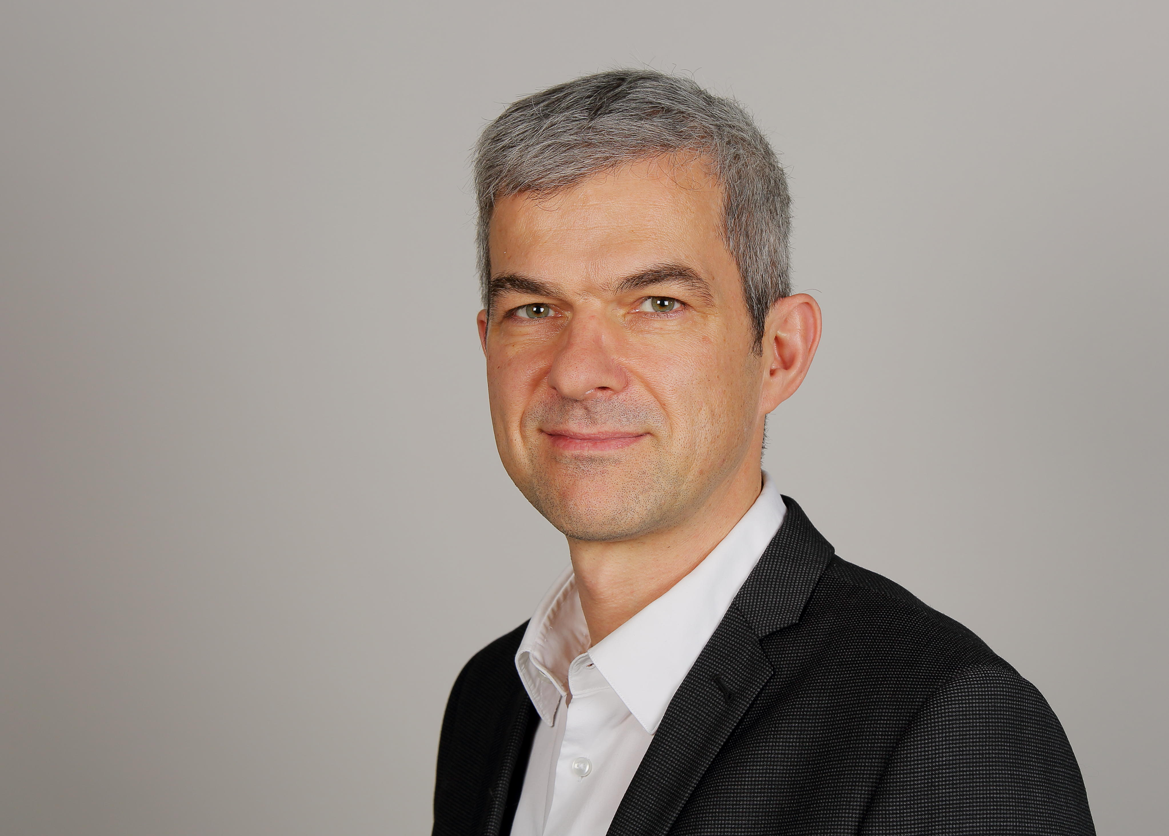 Volkmar Zschocke (Bündnis 90/Die Grünen)